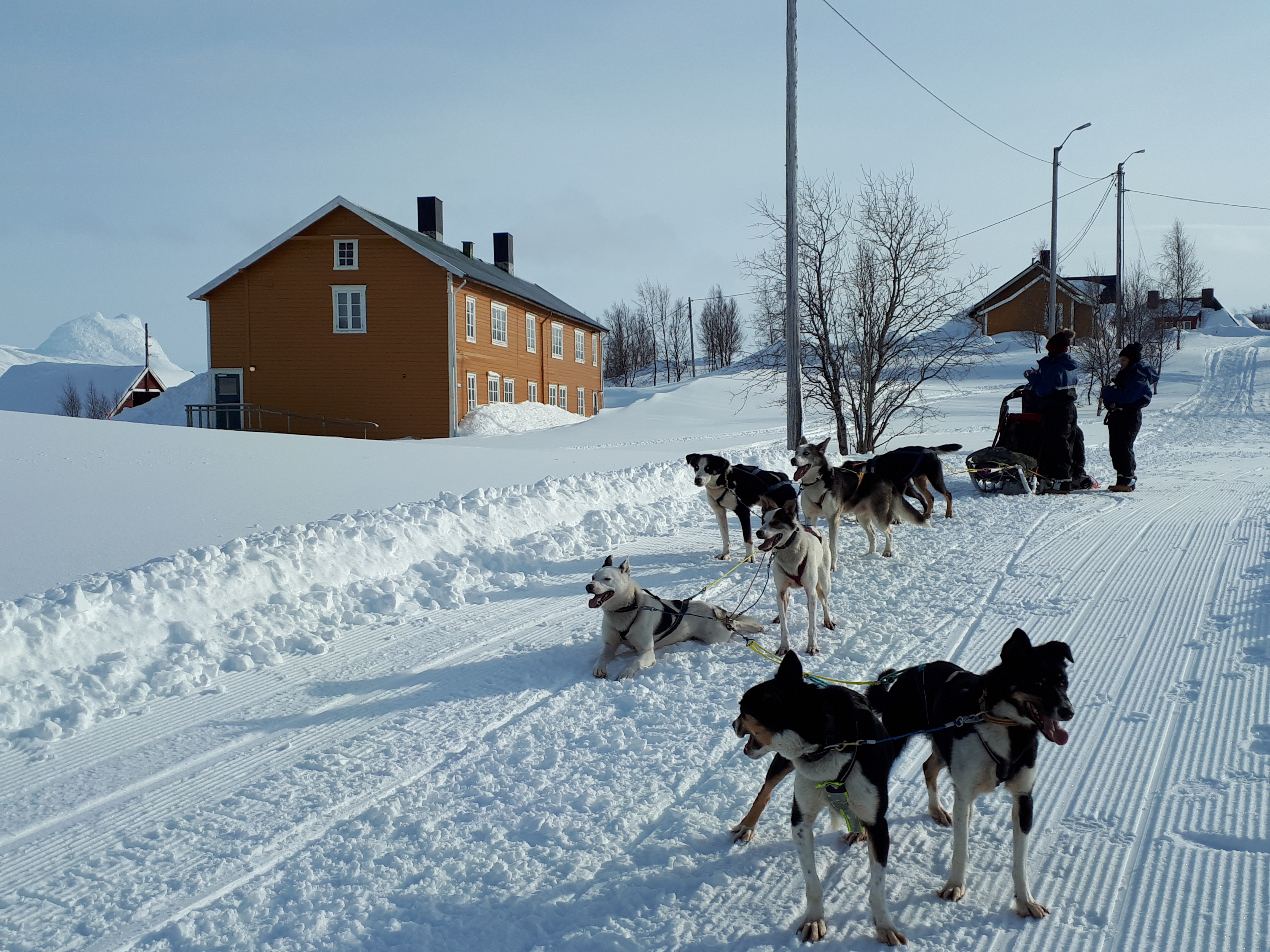 Foto: Nexans